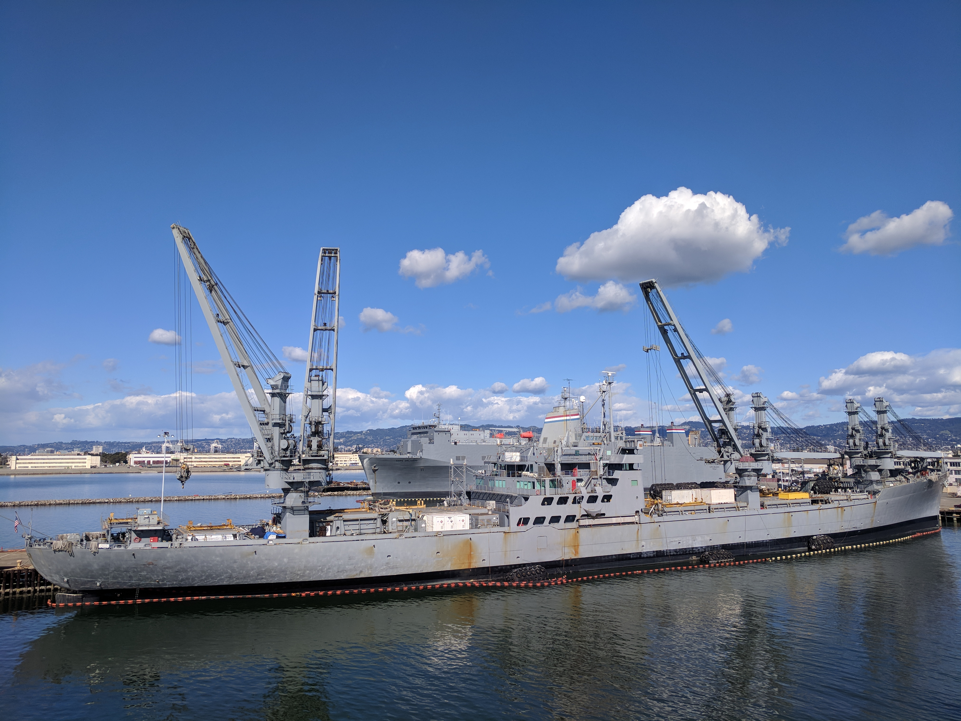 Gem State. Alameda.